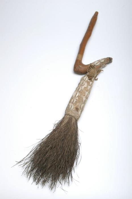 Priesterattribuut. Bijzonder, reeds oud voorwerp dat door de rituele specialist, de obiaman of bonuman, gebruikt werd en wordt om boze geesten weg te 'vegen' tijdens rituele dansen. Het heeft magische kwaliteiten. Dit kan herleid worden uit o.a. de gebruikte materialen zoals pemba (witte klei), kaurischelpen en de kleur blauw, die volgens de Marrons een afwerende kracht heeft. Legêne meldt dat deze obia en H-2966 - beide door van Breugel, die ze als een soort bezem beschouwde, in 1824 vanuit Suriname als curiositeit naar Nederland meegenomen - ten onrechte werden toegeschreven aan de bosnegers in plaats van aan de slaven. Van Breugel verwierf ze op plantage Clifford Kocqshove. Hiermee wil zij aanduiden, dat na 1871 in Nederland "in de volkenkundige collecties van de negentiende eeuw iedere relatie met slavernij verdween van objecten uit de slavencultuur zelf. De slavernij bestond toen niet meer en de slaven waren inmiddels christenen geworden; de bosnegers representeerden de vreemde cultuur waartoe het museum zich wilde verhouden" (1998: 384-388).. Magische bezem van medicijnman ter verdrijving van geesten bij rituele dans